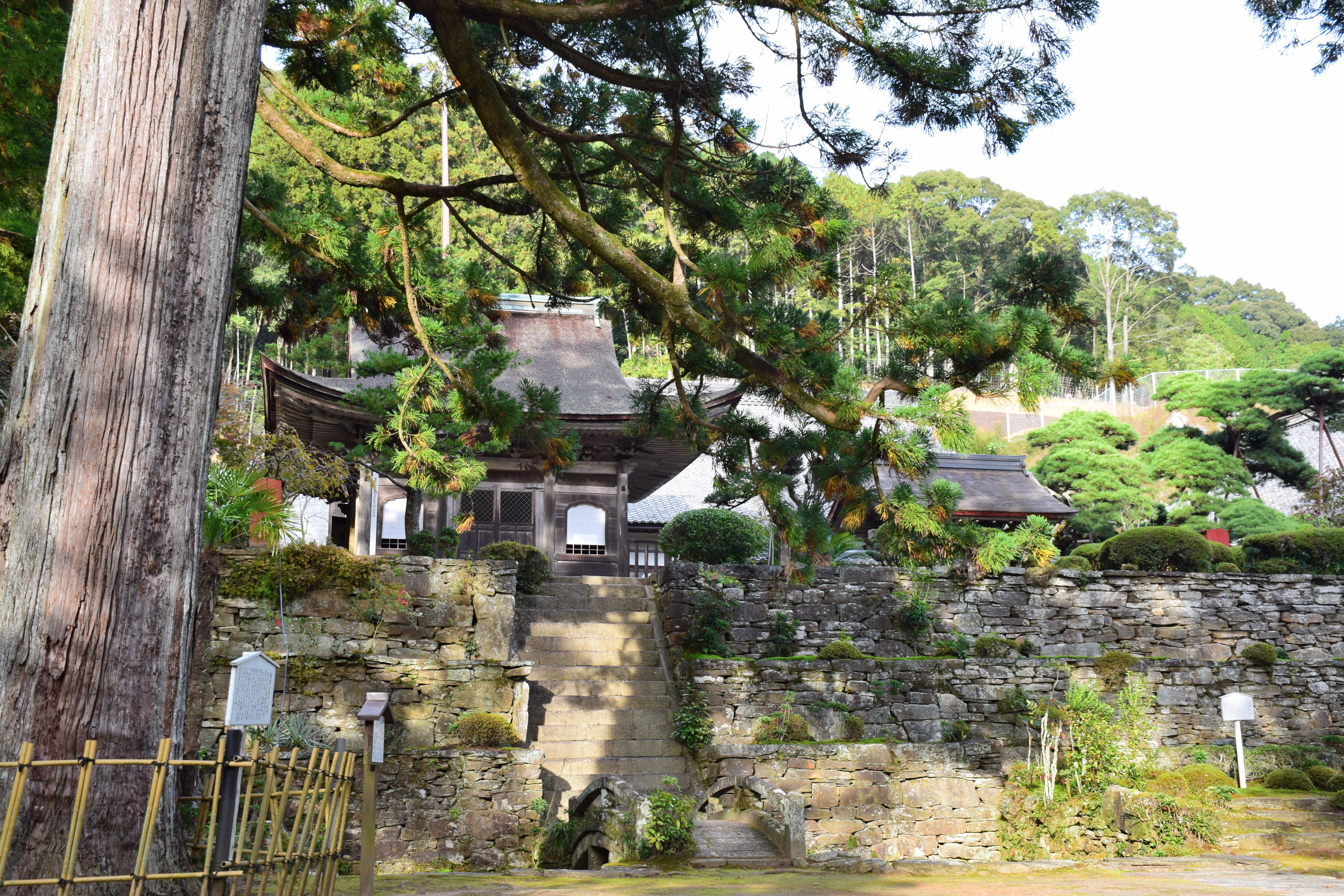 天恩寺の境内